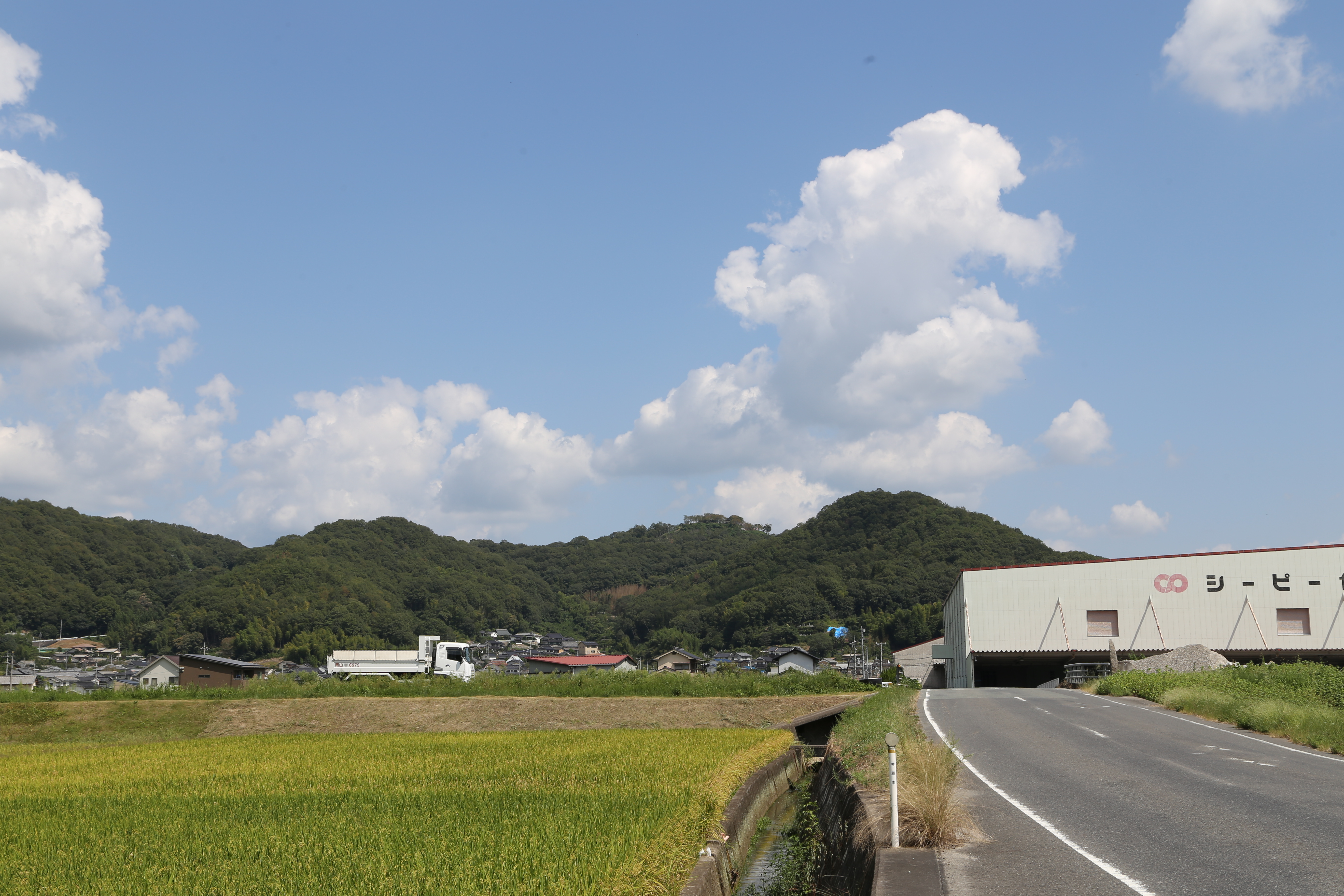 岡山県井原市の高越山、中世には高腰山城という城があった。